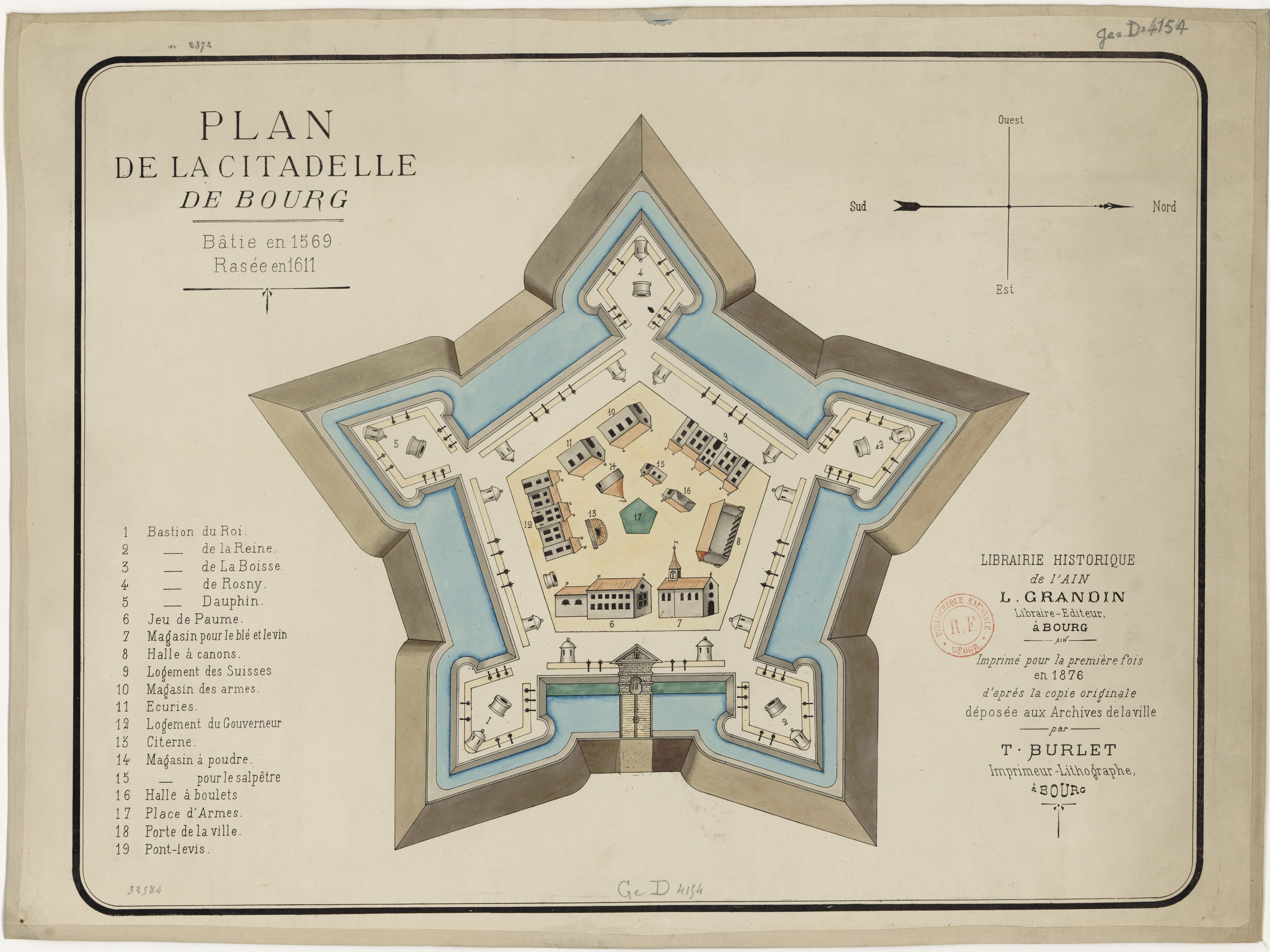 Plan de la citadelle de Bourg, bâtie en 1569, rasée en 1611.